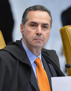 Luis Roberto Barroso no julgamento sobre desaposentação.